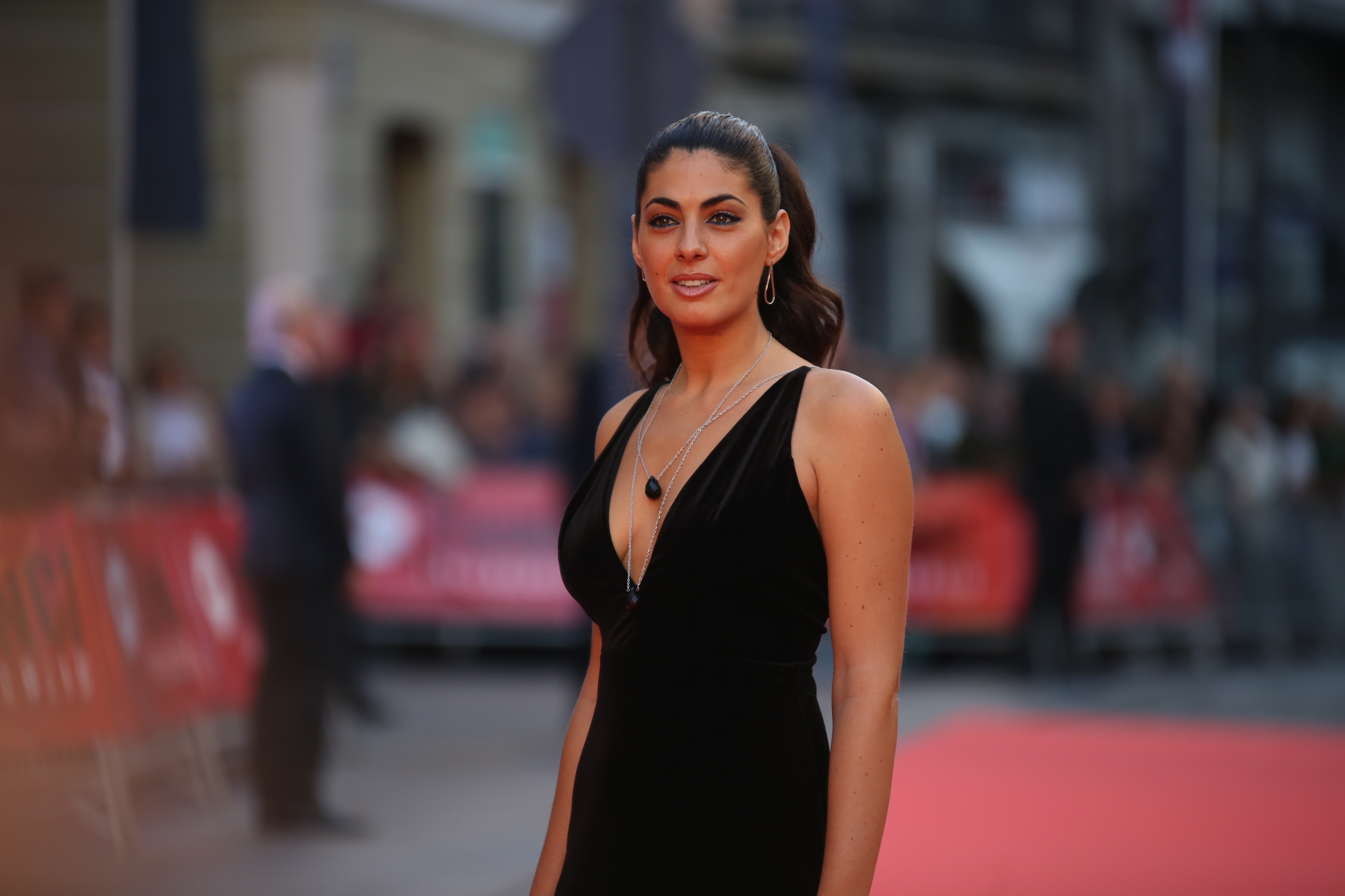 Seminci 2016